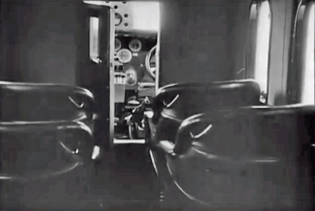 Junkers G 24 Kabine und Cockpit (D-543) 1926